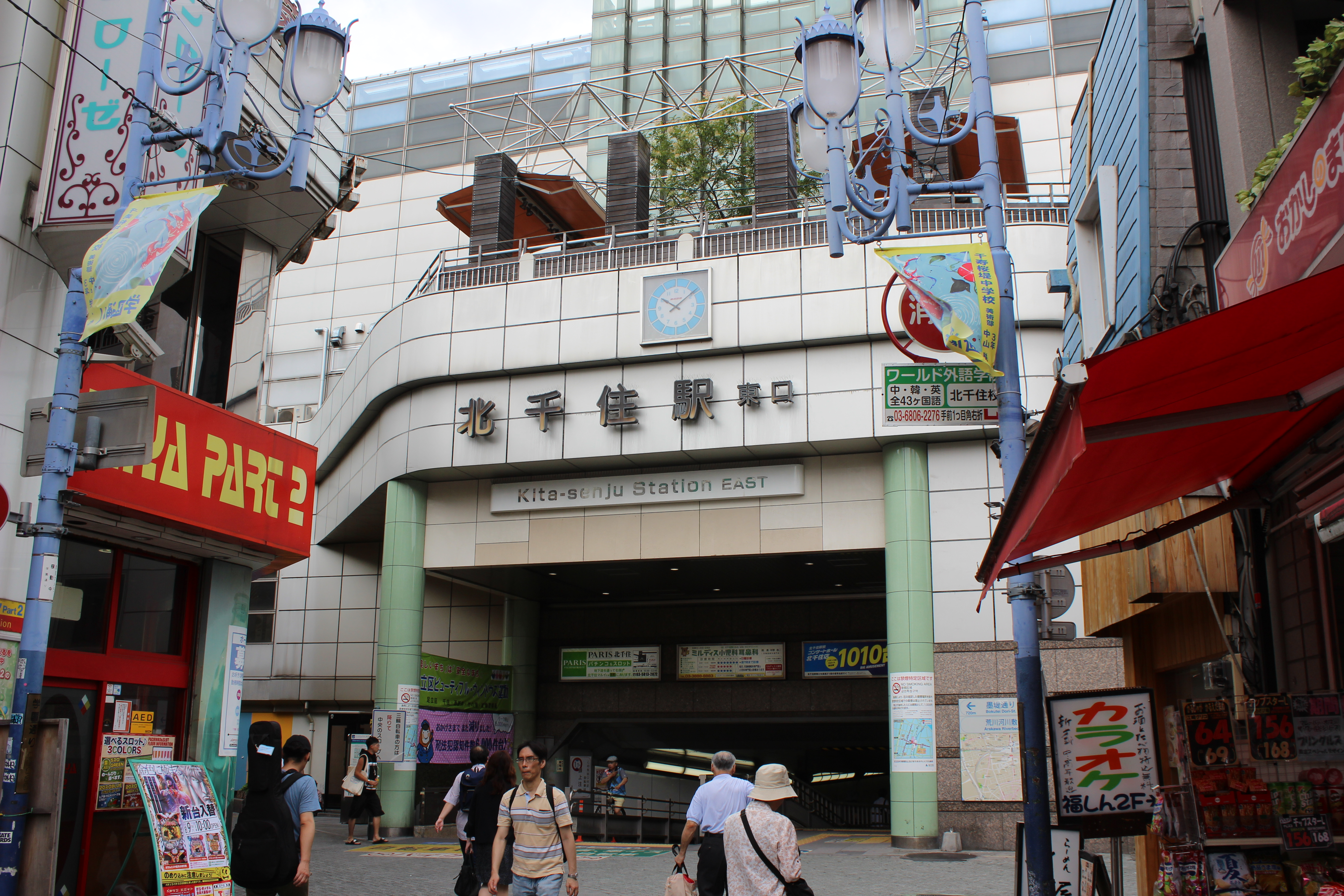 北千住駅東口